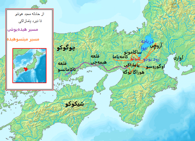 Battle of Yamazaki